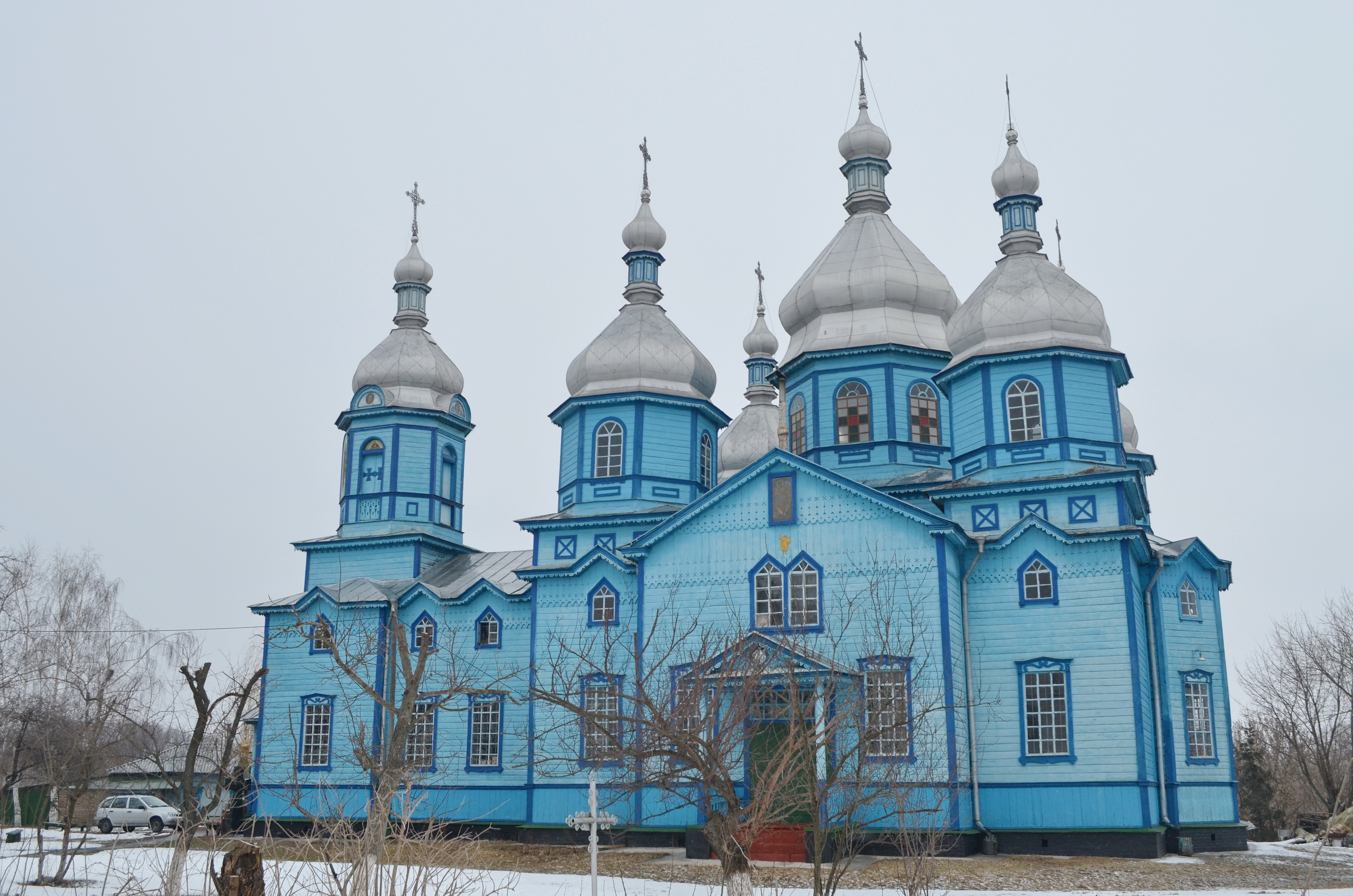 Георгіївська церква (дер.), село Селище. Один з кращих та величних дерев’яних храмів Лівобережної України